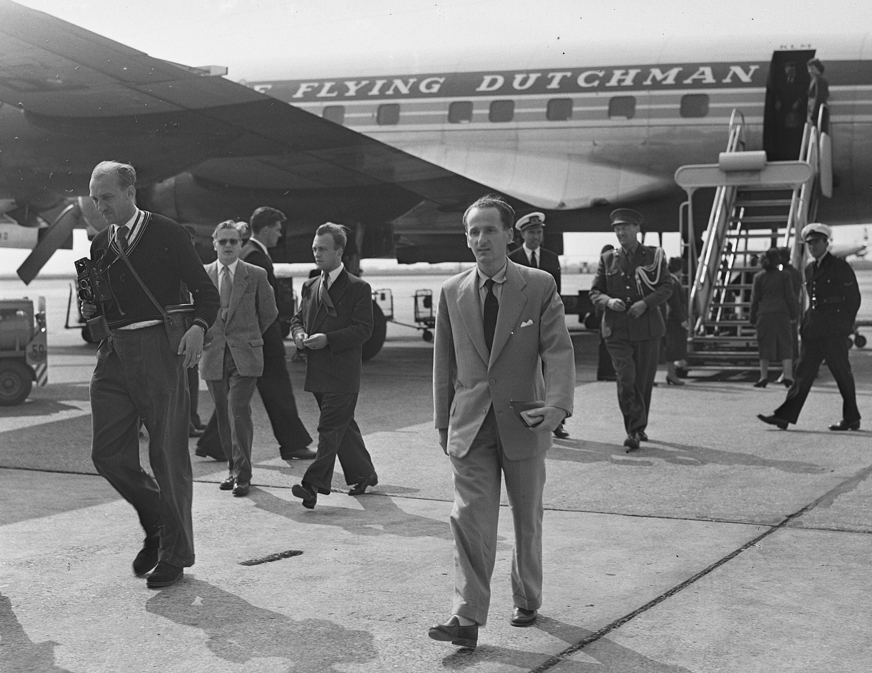 Collectie / Archief : Fotocollectie Anefo Reportage / Serie : [ onbekend ] Beschrijving : Aankomst Robert Ford uit Chinese gevangenschap op Schiphol Datum : 22 juni 1955 Locatie : Amsterdam, Noord-Holland Trefwoorden : AANKOMSTEN Persoonsnaam : Robert Ford Instellingsnaam : Schiphol Fotograaf : Bilsen, Joop van / Anefo Auteursrechthebbende : Nationaal Archief Materiaalsoort : Glasnegatief Nummer archiefinventaris : bekijk toegang 2.24.01.09 Bestanddeelnummer : 907-1984